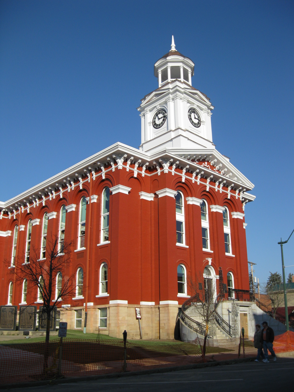 Brookville, Pennsylvania